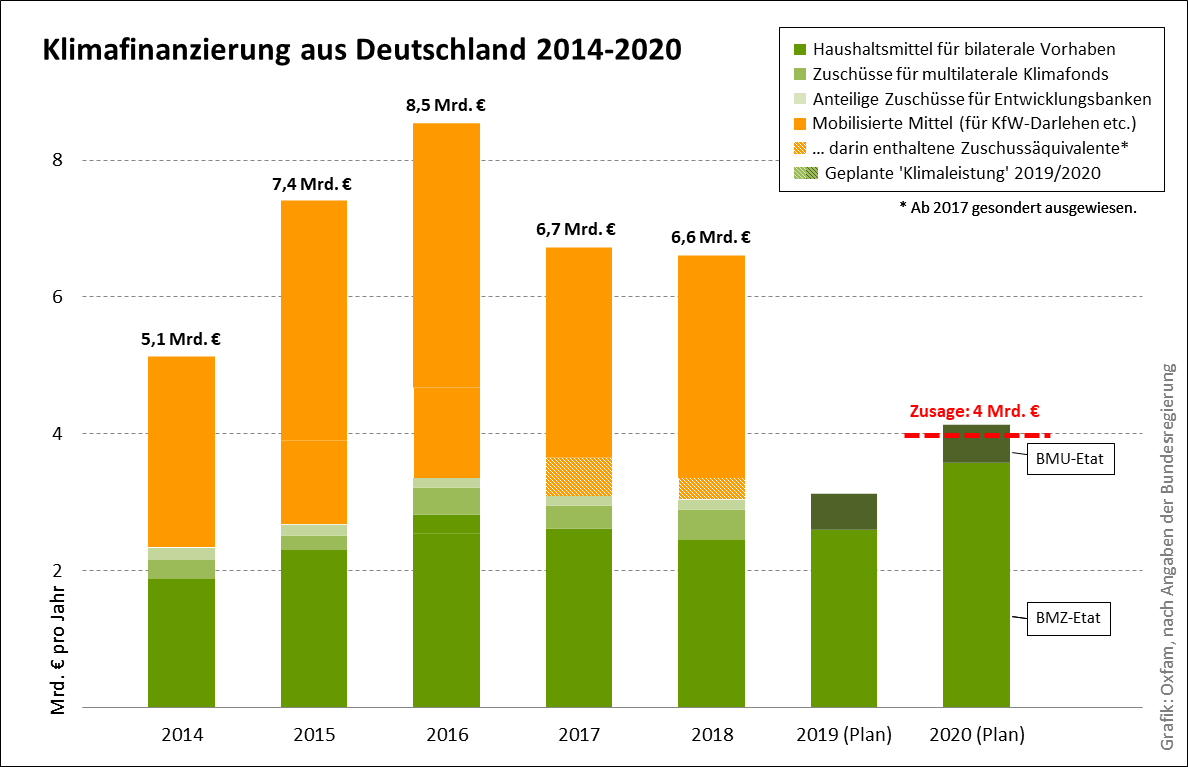 Die grün schattierten Flächen geben die Mittel aus dem Bundeshaushalt wieder, zum Beispiel für bilaterale Zuschüsse oder Beiträge an multilaterale Klimafonds. Die orangefarbenen Flächen zeigen die mobilisierten Mittel, die (über die KfW oder die DEG) in Form von Krediten oder Beteiligungen weitergereicht werden. Seit 2017 weist die Bundesregierung die Zuschussäquivalente von zinsvergünstigten Krediten gesondert aus und weist die in der Außendarstellung den grünen Bereichen zu. Das gibt die tatsächliche finanzielle Transferleistung zwar besser wieder, hat aber den für die Bundesregierung günstigen Effekt, dass die Kürzungen der Klimafinanzierung 2017 gegenüber 2016 unsichtbar wird. Für 2019 und 2020 gibt es nur Angaben zu den Planzahlen für die Haushaltsmittel.